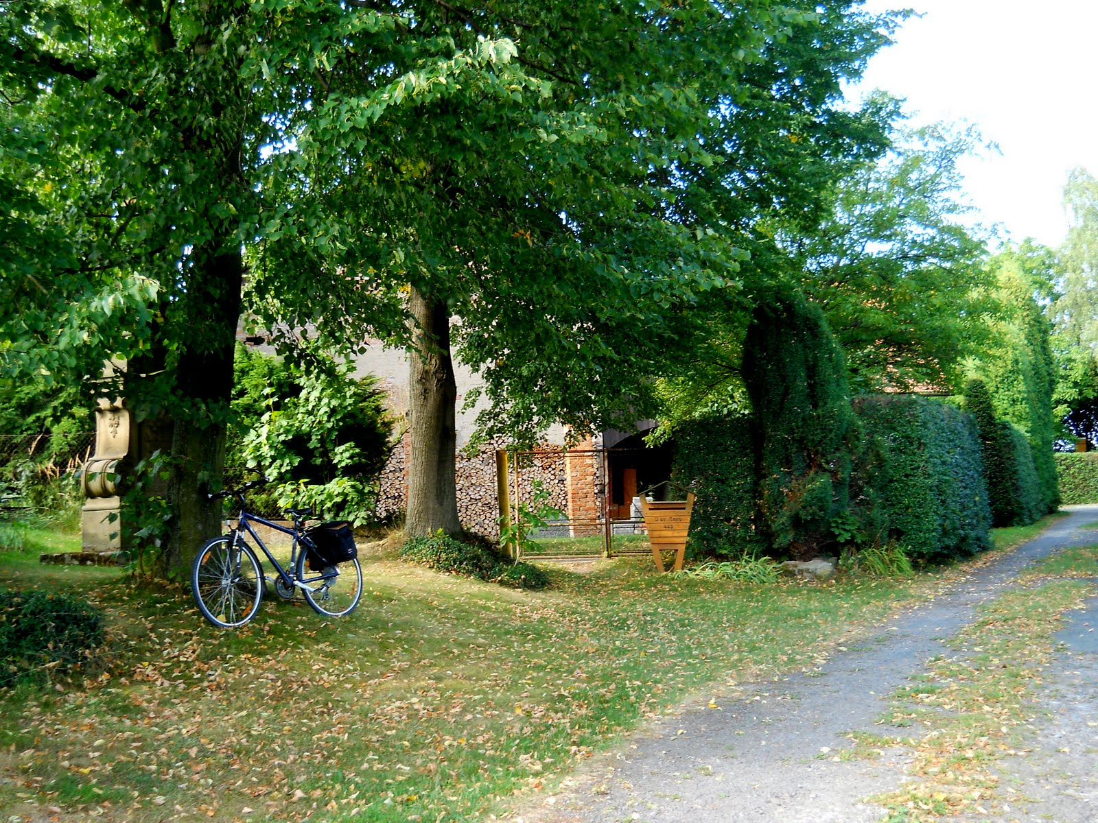 Q26779318